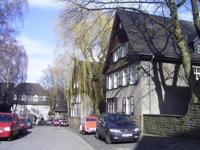 Häuser der Gartenstadt Margarethenhöhe in Essen März 2004 Autor: Denis Barthel Lizenz: GNU-FDL